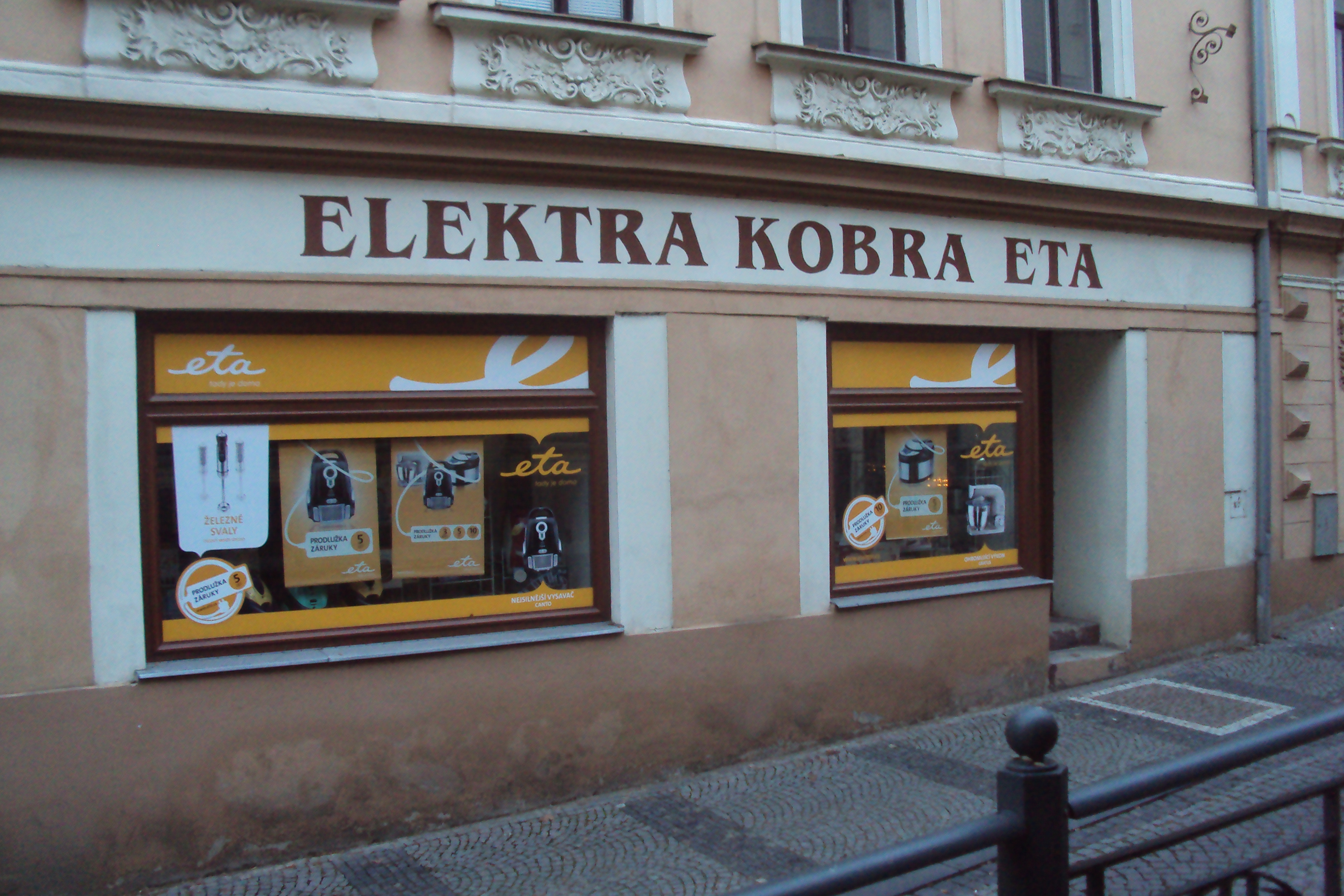 Specializovaná prodejna pro výrobky ETA, Česká Lípa